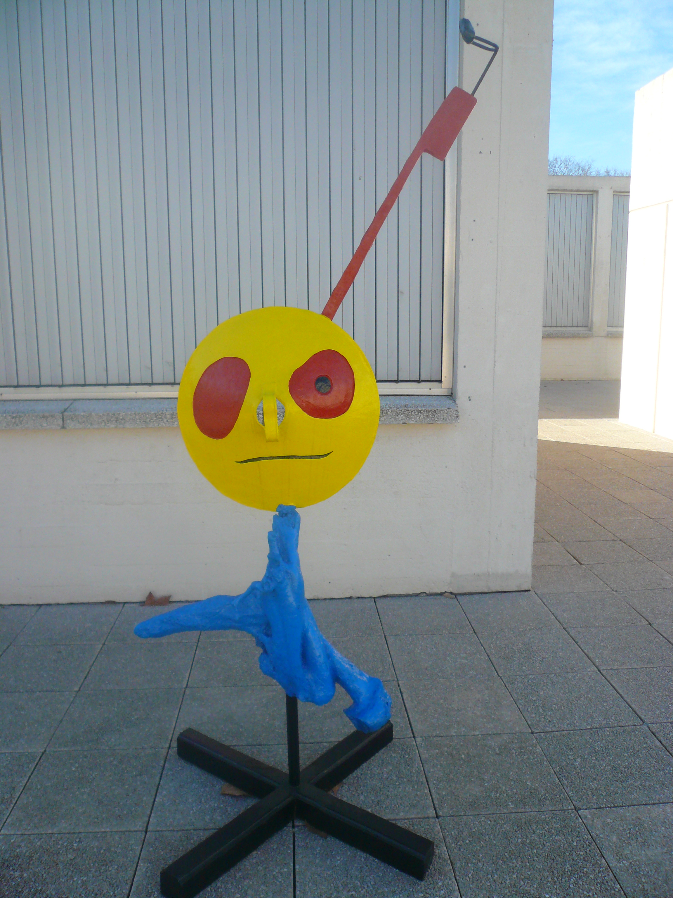 Fundació Miró (Barcelona) Object location41° 22′ 07″ N, 2° 09′ 36″ E